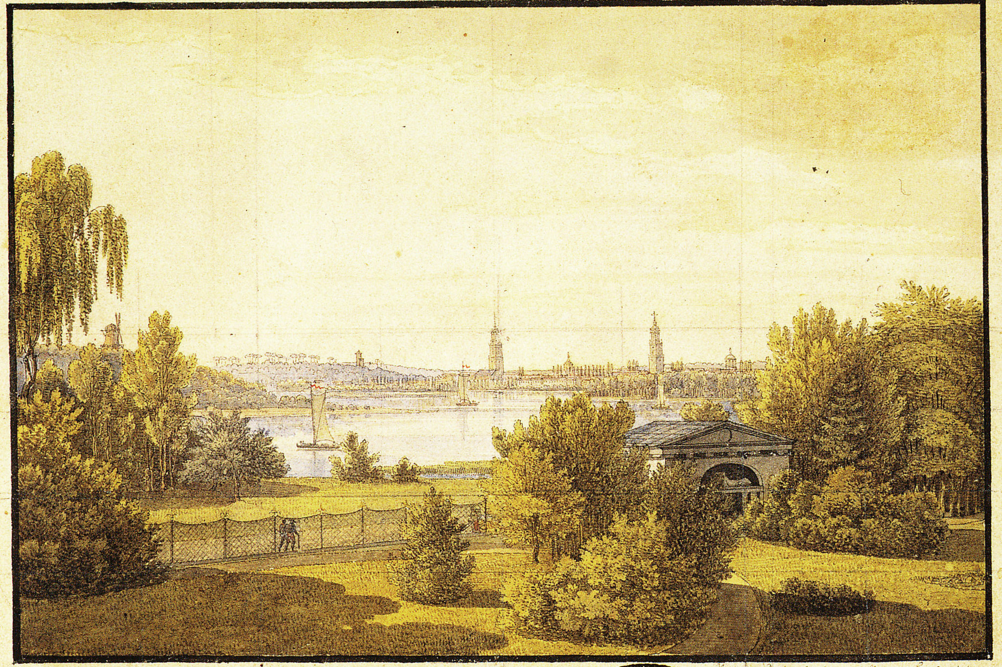 Aussicht vom Gutshaus Klein-Glienicke über die Neugierde nach Potsdam, Aquarell